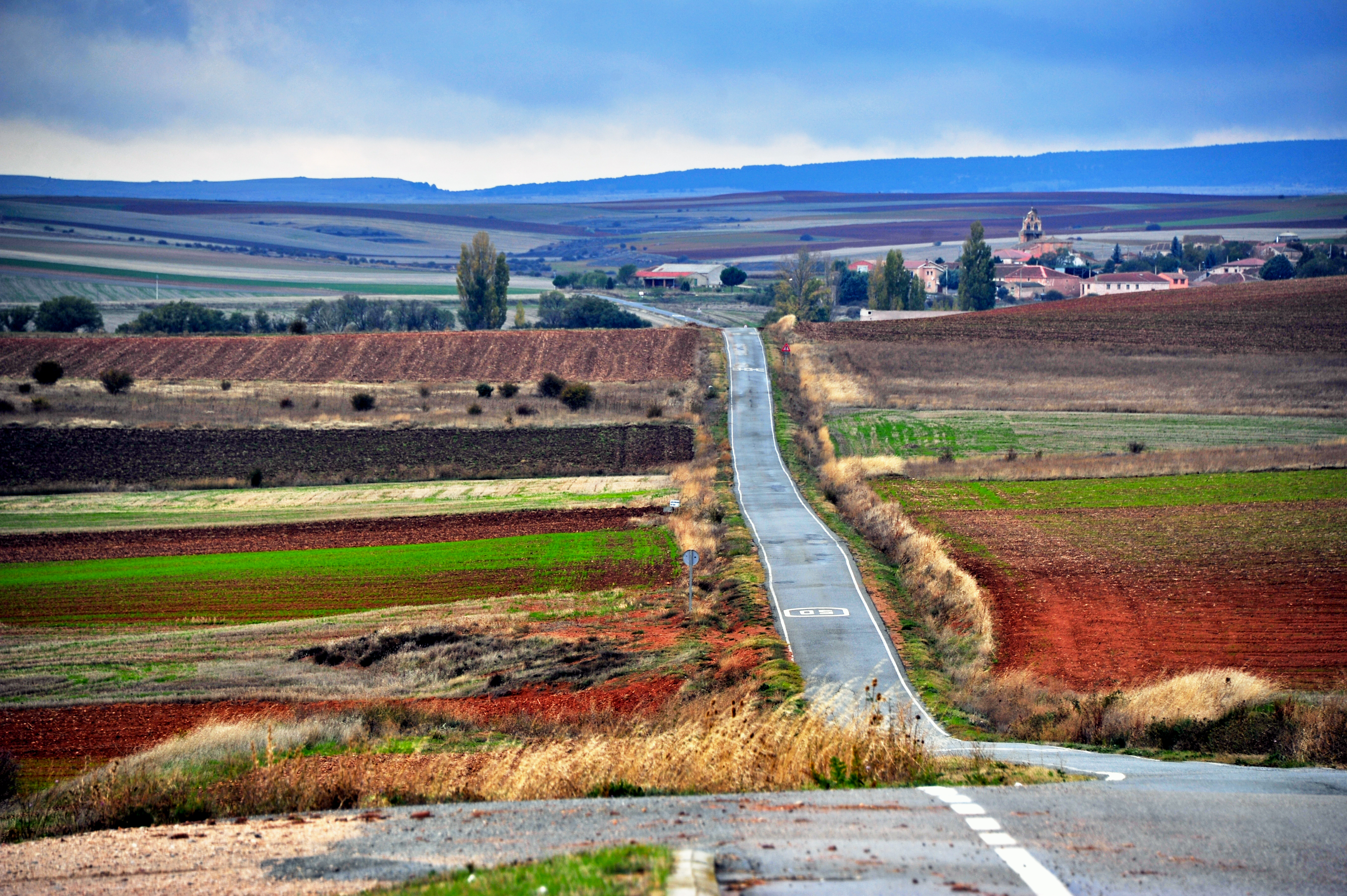 Vista de Encinas en Tierras de Sepulveda